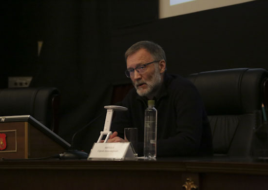 Политолог Сергей Михеев выступает перед личным составом Главного командования Сухопутных войск с лекцией «Славянский мир. Исторические и географические особенности отношений стран-участниц СНГ»